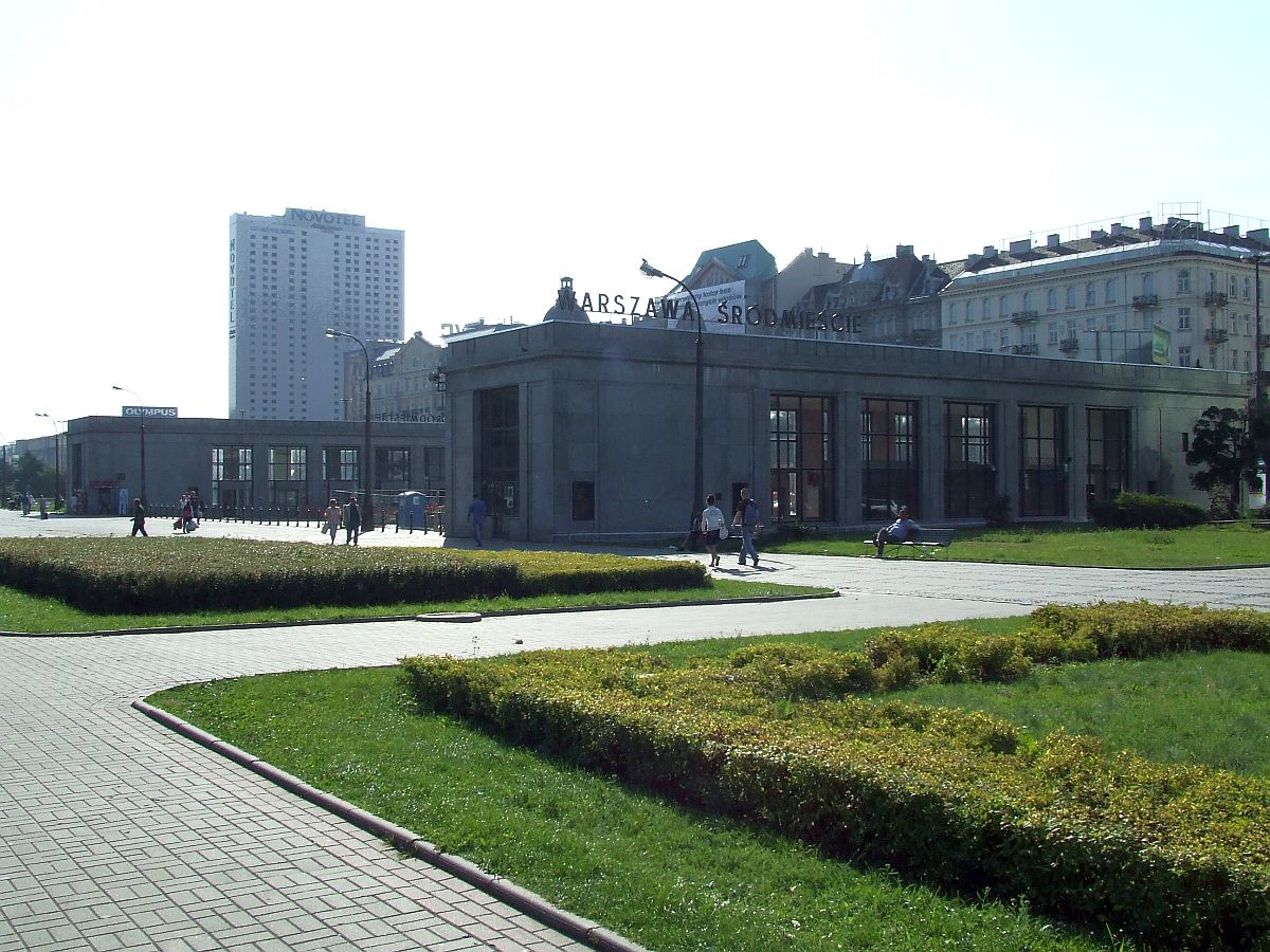 Warszawa Śródmieście